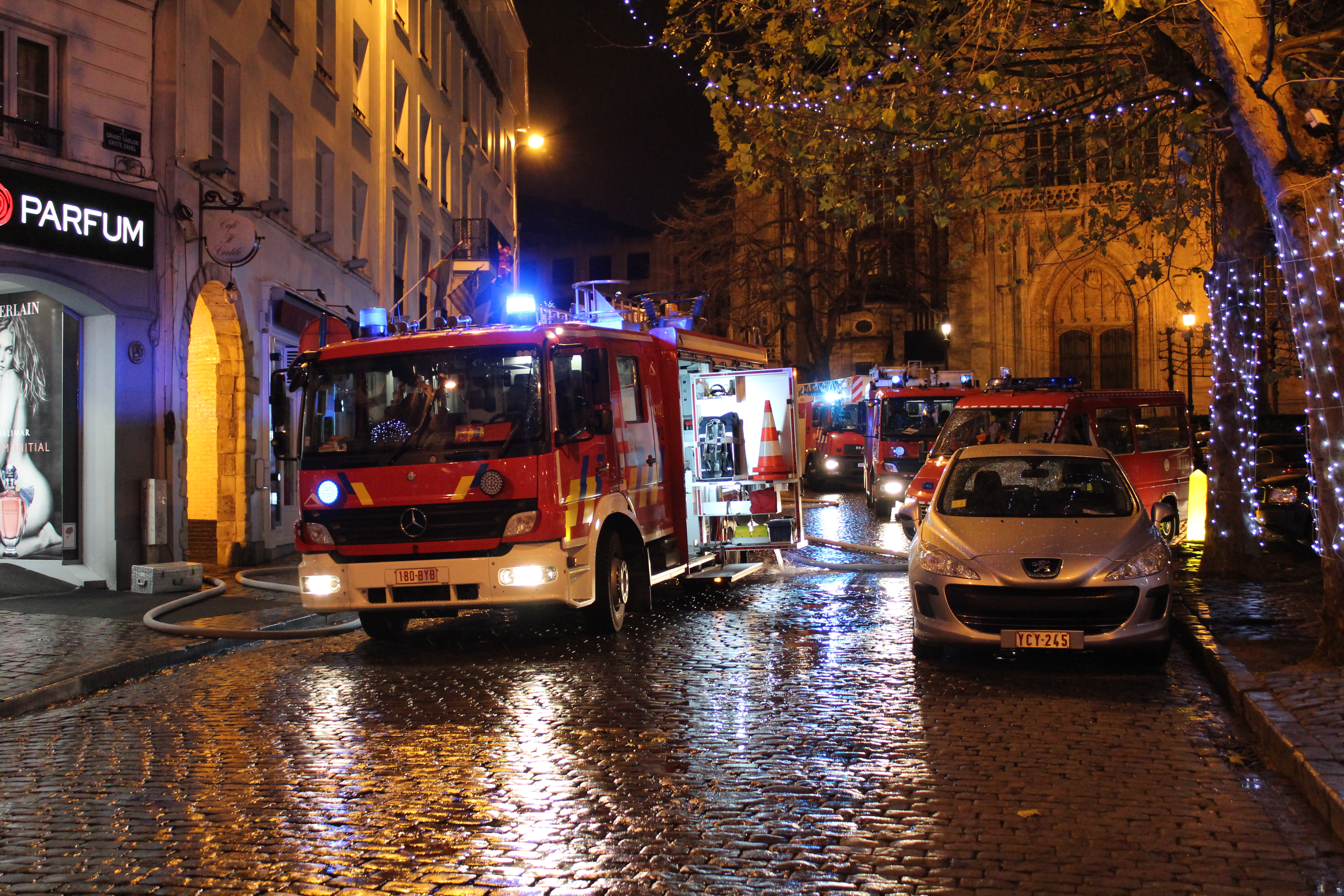 Camions de pompiers en intervention de nuit, place du Grand Sablon à Bruxelles.